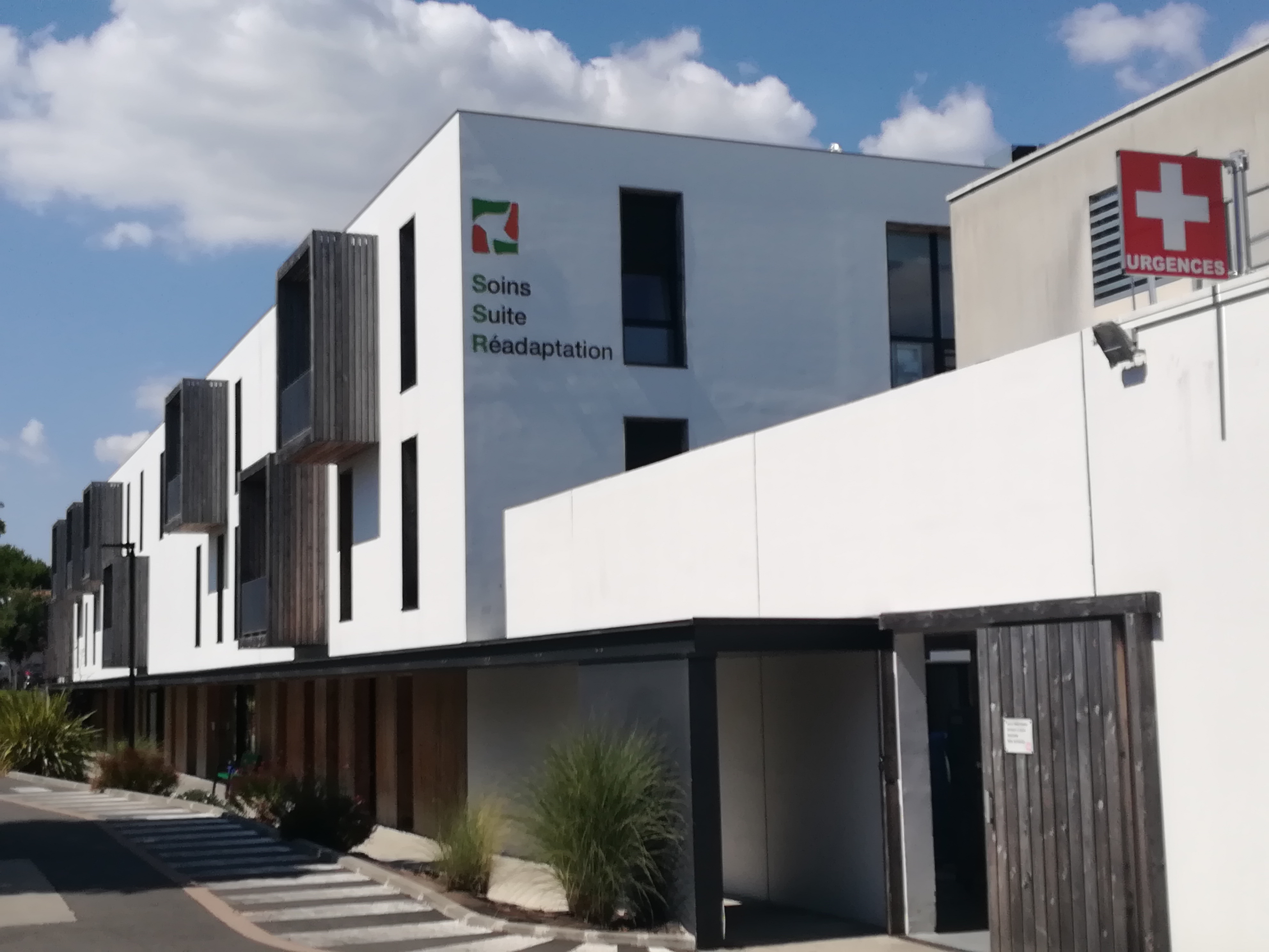 La polyclinique de St-Georges-de-Didonne